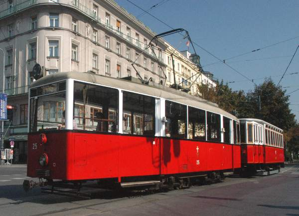 Kriegsstraßenbahnwagen in Wien.